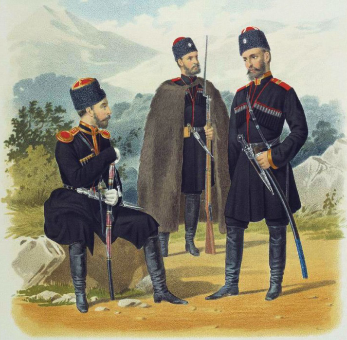 Местные команды Кубанских Казачьих войск. Обер-офицер - в парадной форме, Фельдфебель и Рядовой - в парадной и обыкновенной форме. ( приказ по воен. вед. 1884 г. № 181 )